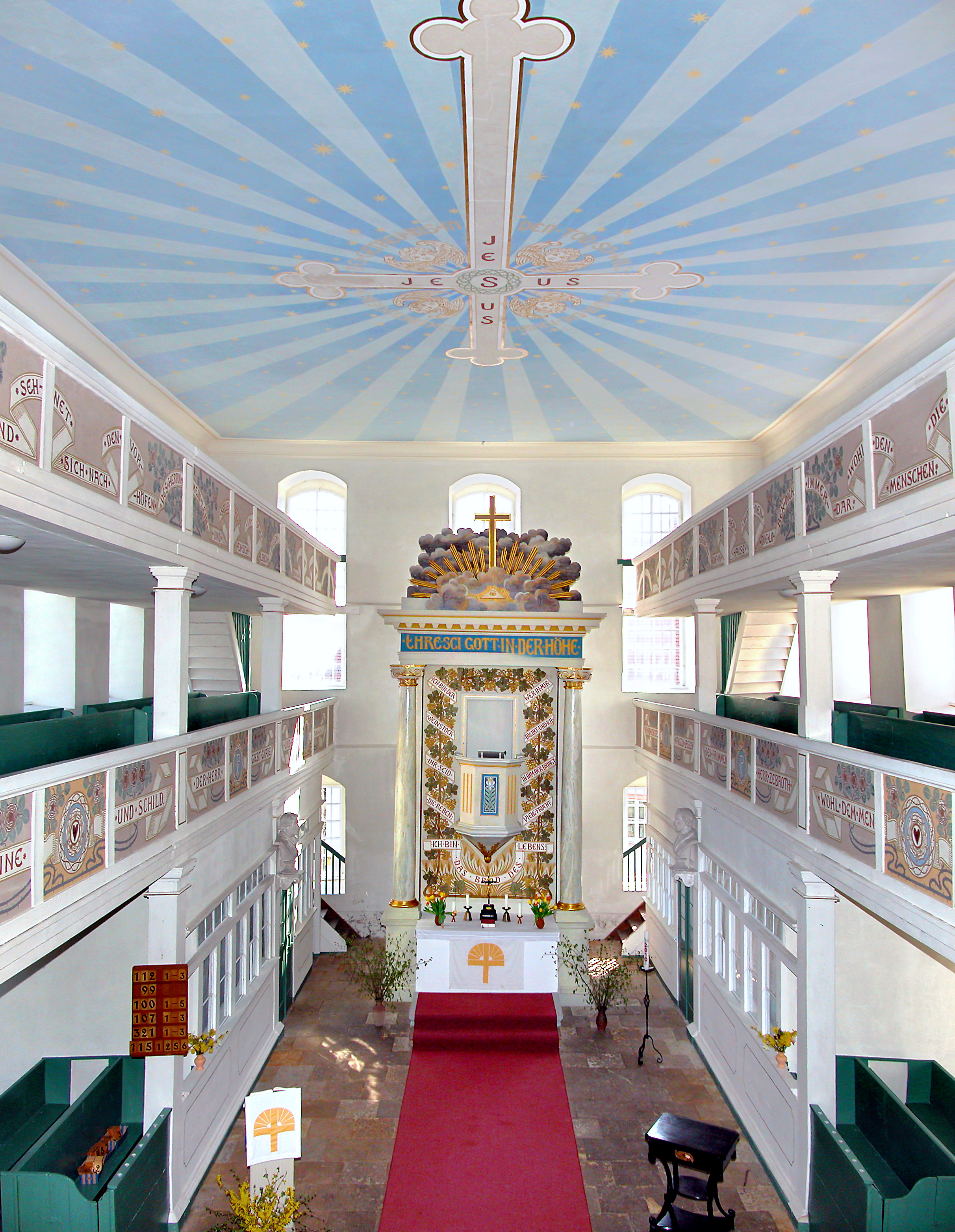 13.04.2010 04668 Zschoppach (Grimma), Kirchstraße 2 (GMP: 51.214388,12.885833): Evangelische Dorfkirche Zschoppach. Erbaut 1833, saniert fertig 2003. [DSCN40904-40905.TIF]20100413030MDR.JPG(c)Blobelt